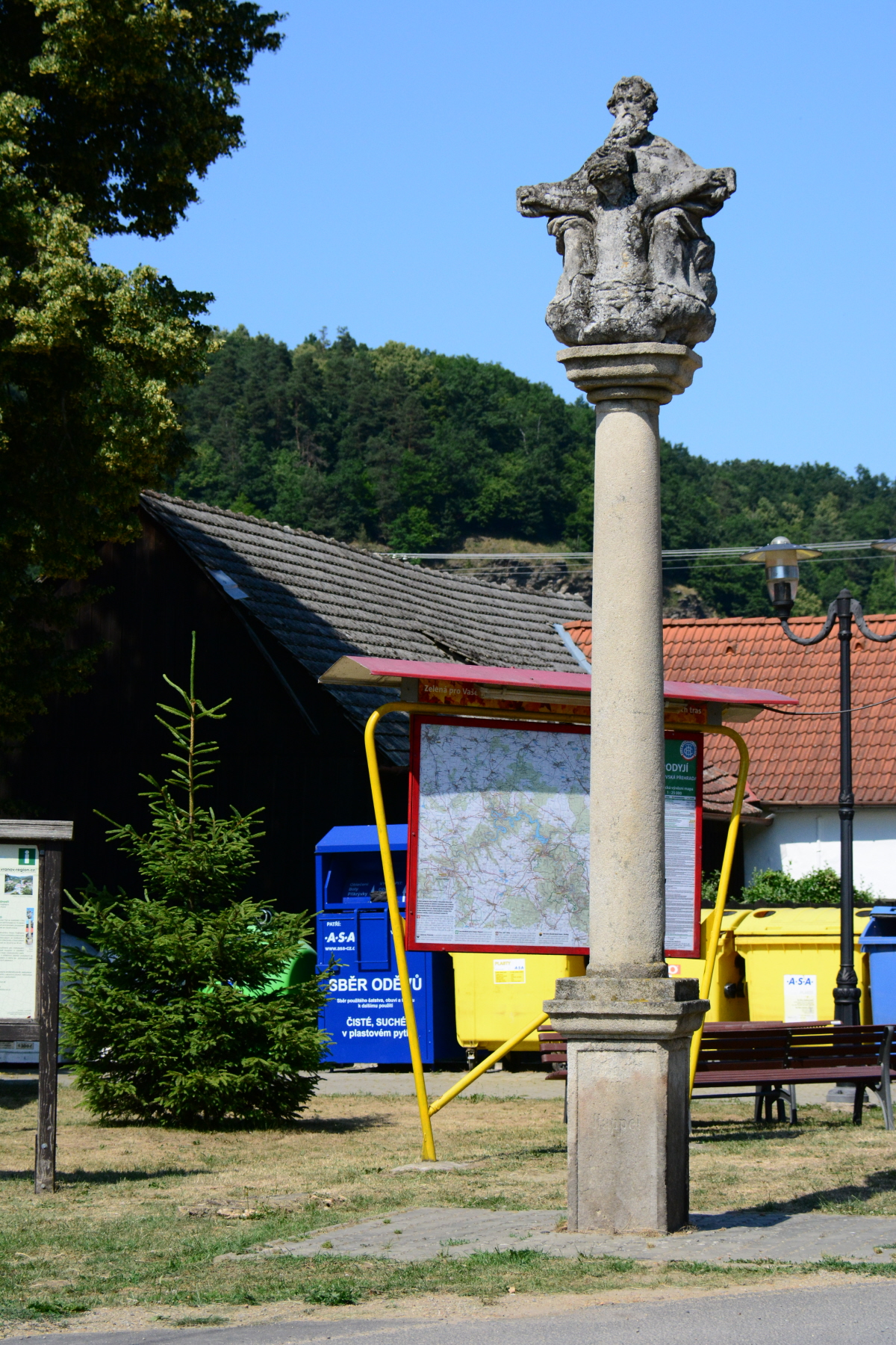 Die Dreifaltigkeitssäule von Podhradí nad Dyjí - Freistein in Südmähren (Tschechische Republik)